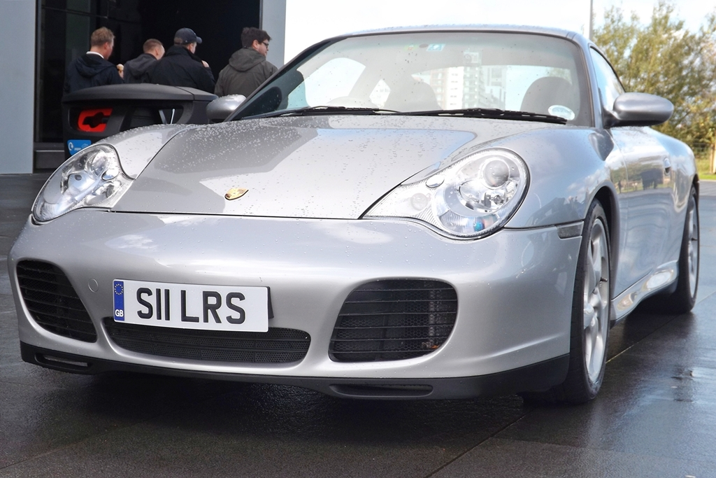 Porsche